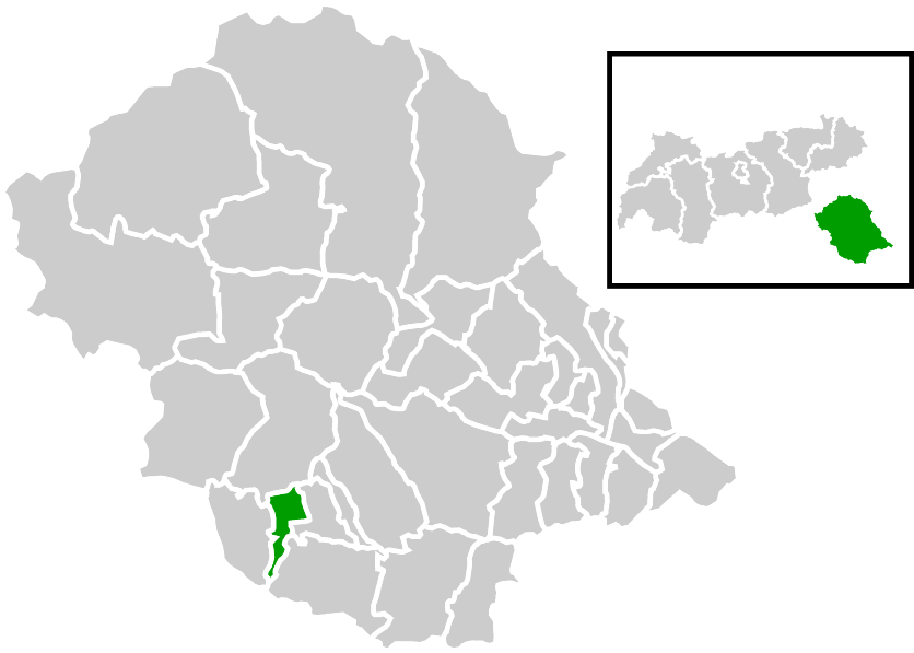 Lage der Gemeinde innerhalb des Bezirks Lienz